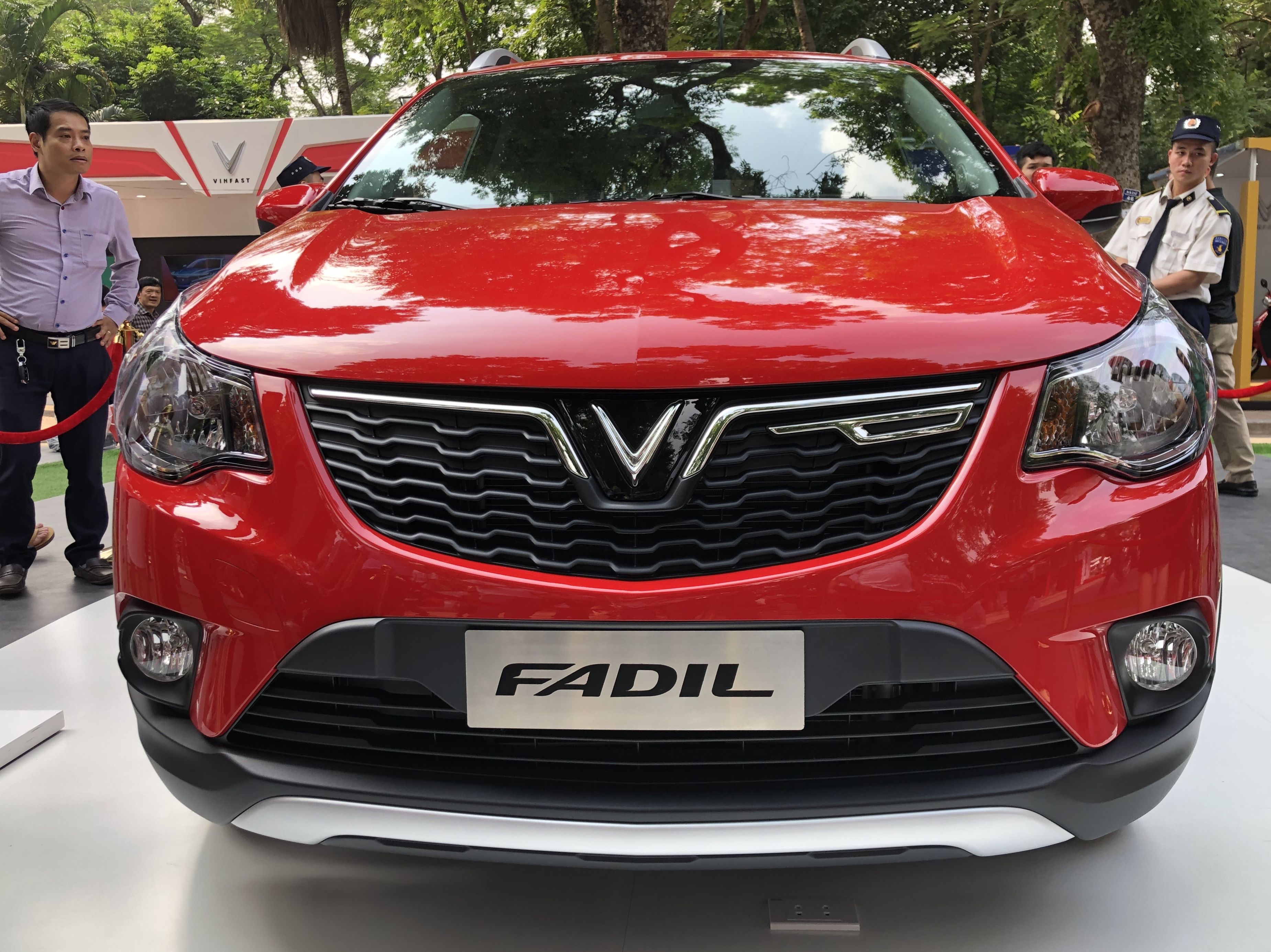 Xe hơi VinFast Cadil màu đỏ